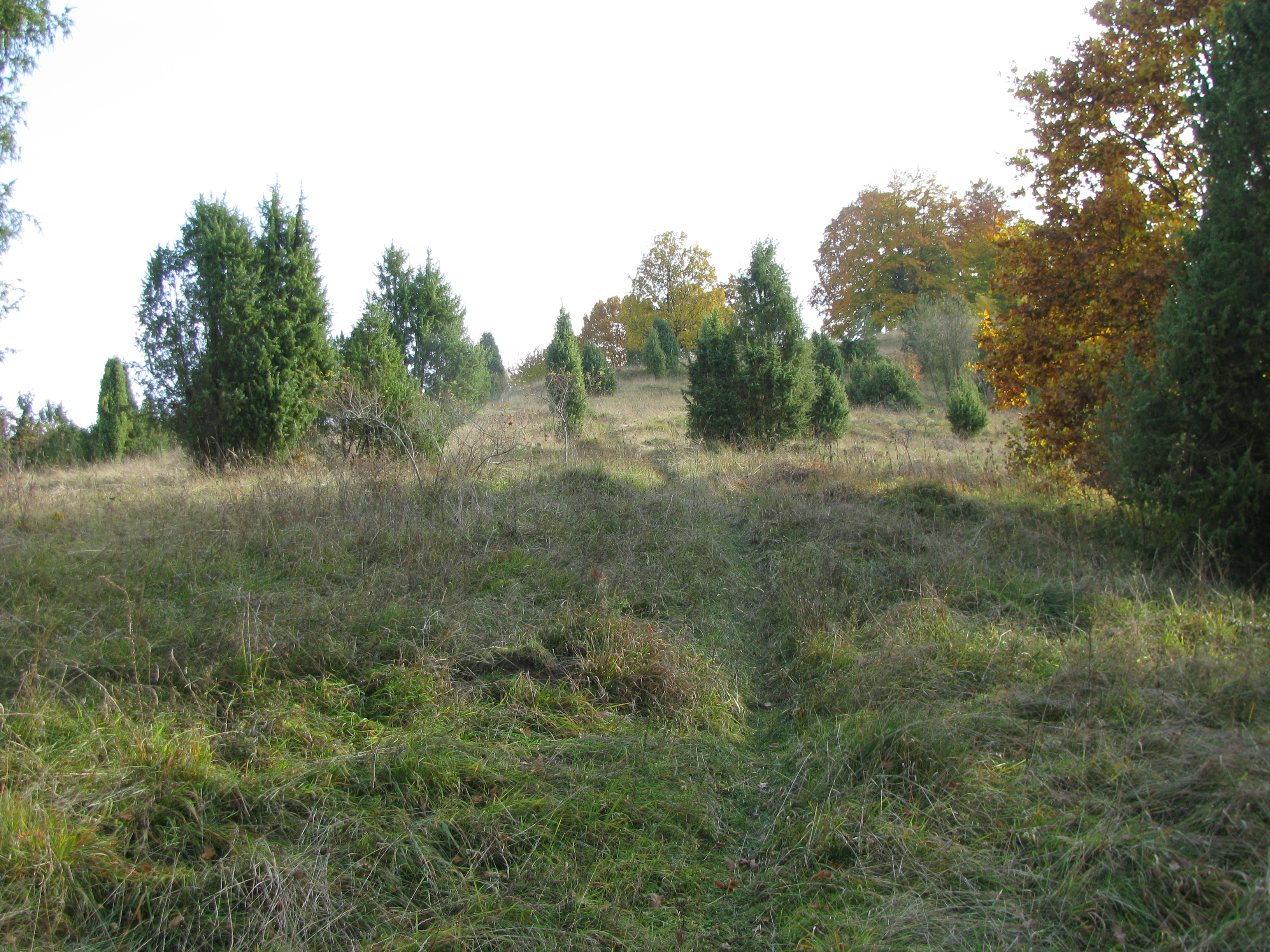 Blick auf den Dörneberg, von Viesebeck kommend, FFH 4620-303